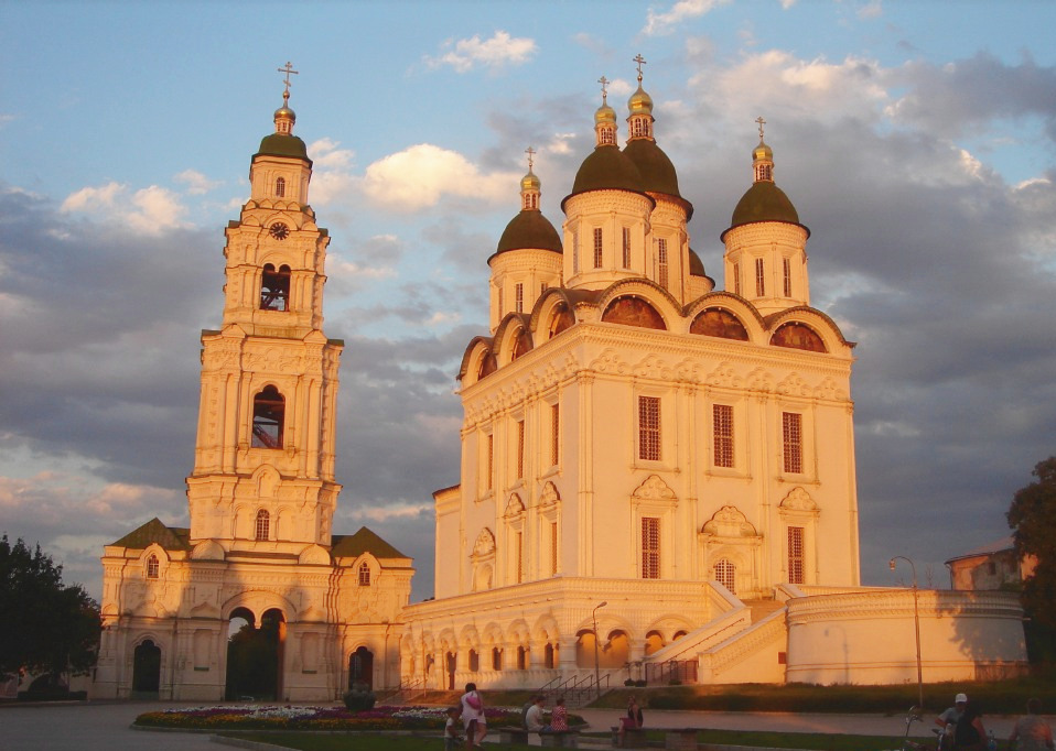 Astrakhan Uspenski Cathedral at sunset